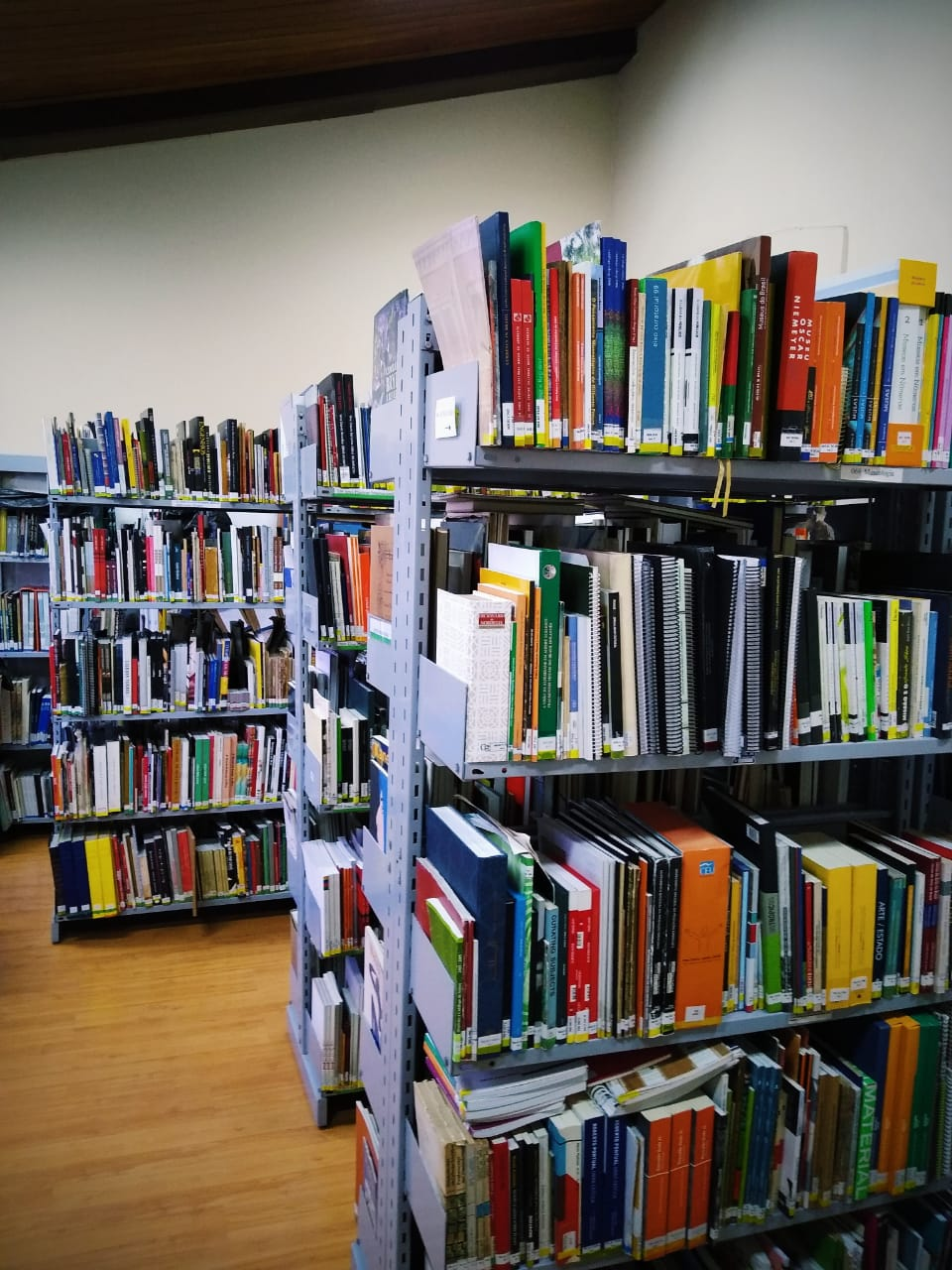 Registro do acervo da biblioteca do MAMAM